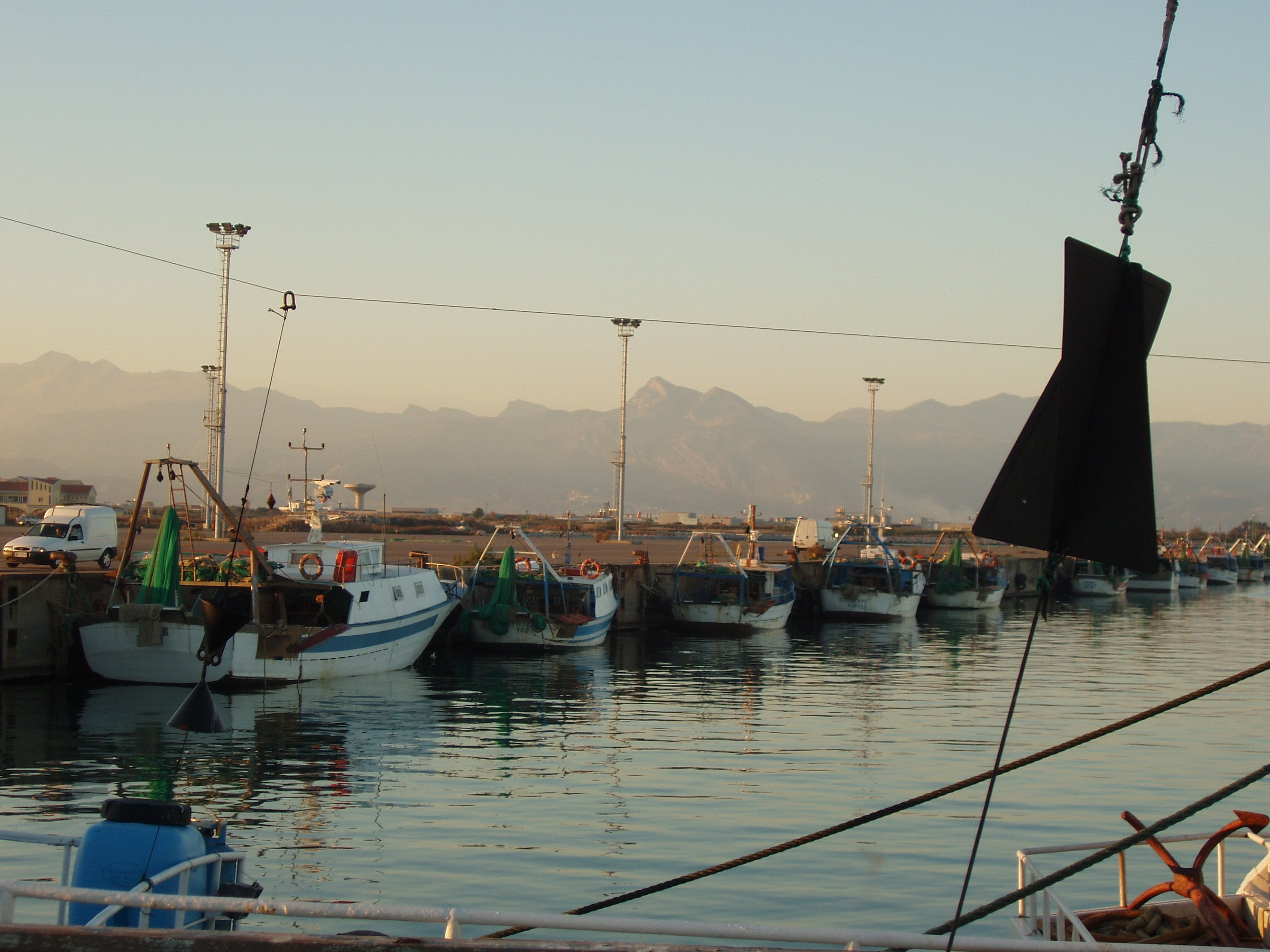 Corigliano Calabro - Il porto Foto di Luigino C.